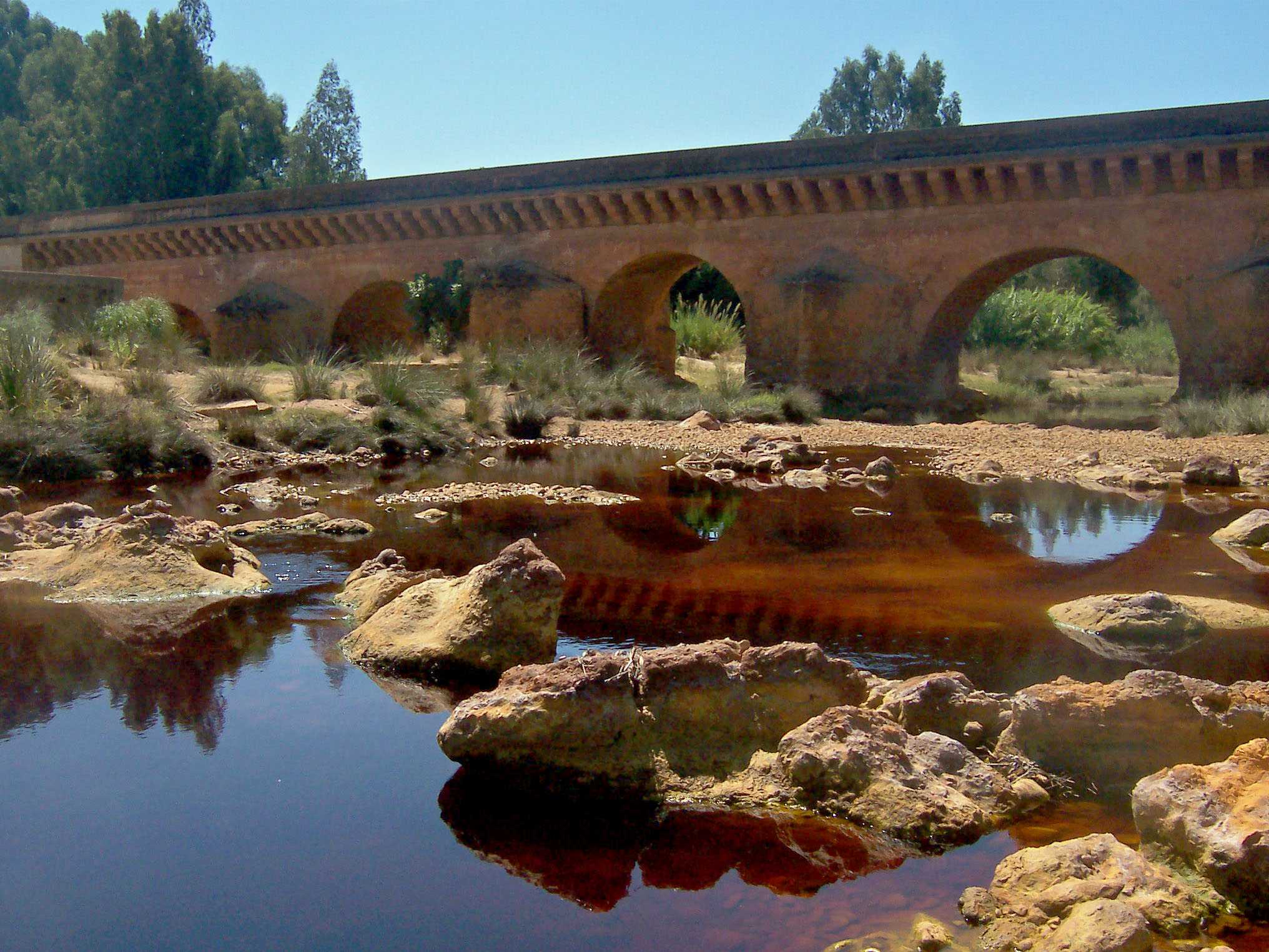 Puente Romano sobre el río Tinto, Niebla, Huelva, España